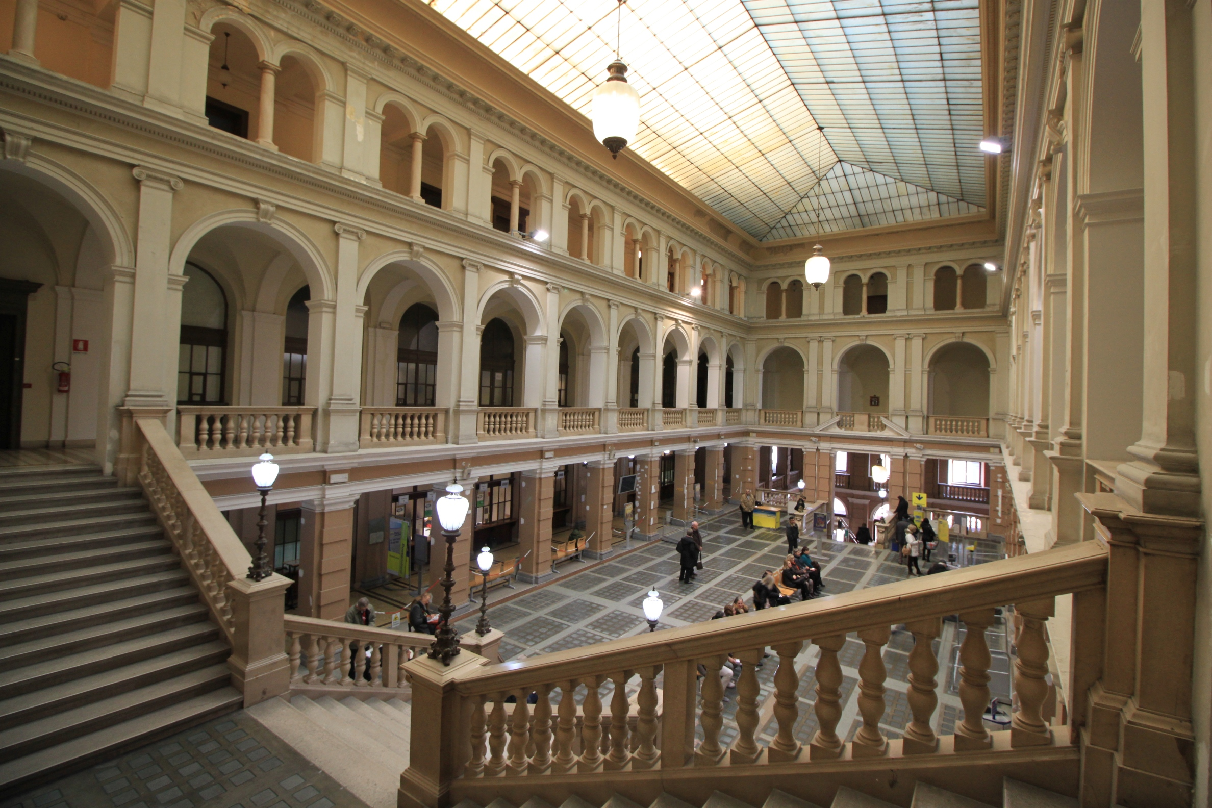 Palazzo delle Poste, Piazza Vittorio Veneto, Trieste; Interiore